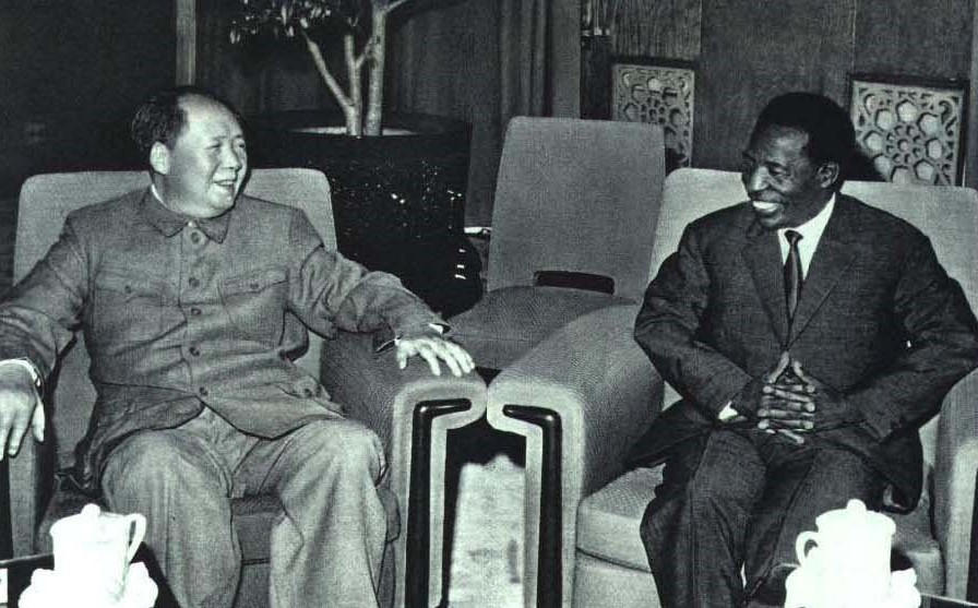 1964-11 1964年9月29日 毛泽东会见刚果总统阿方斯·马桑巴-代巴 Alphonse Massamba-Débat